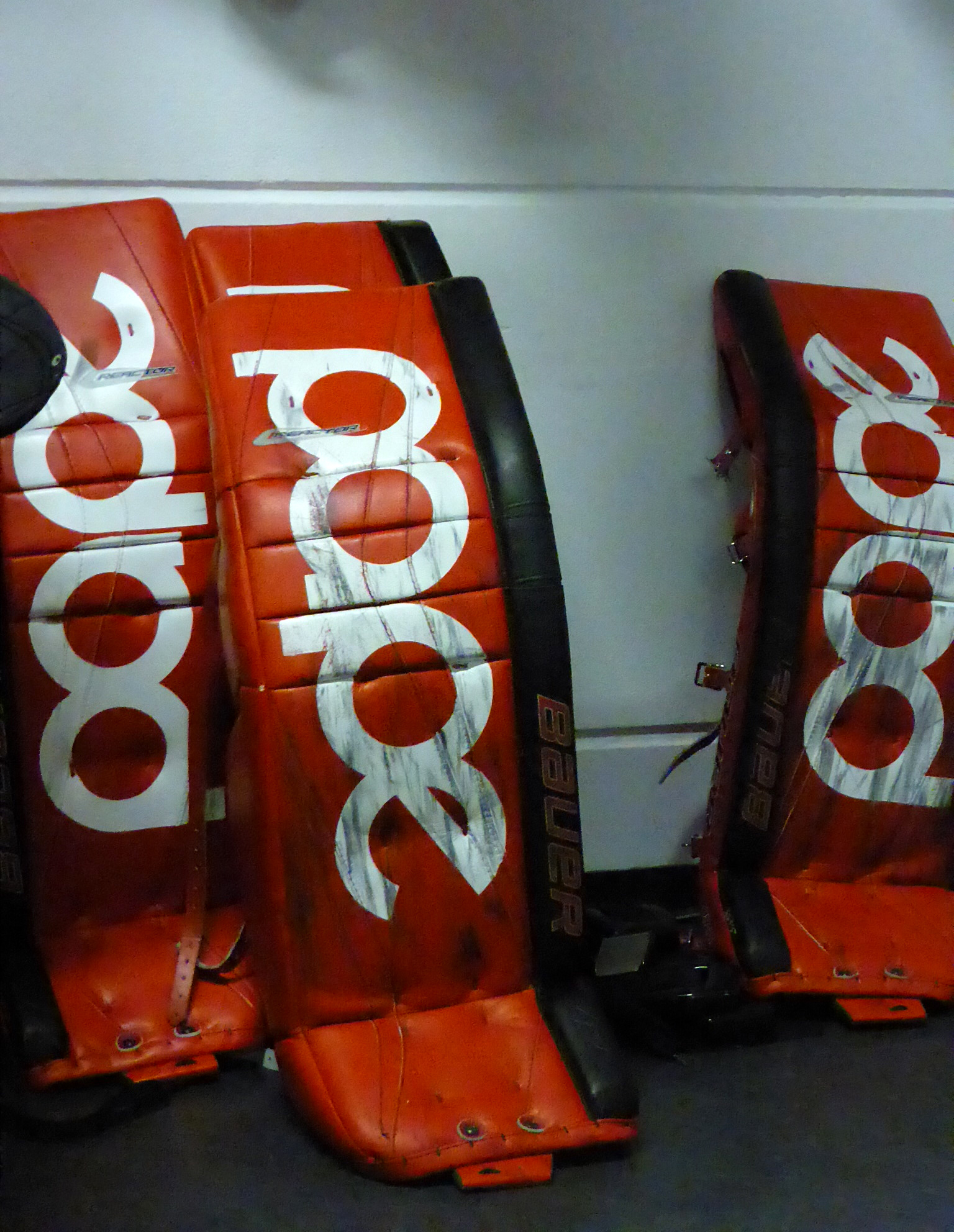 Eishockeyausrüstung (Torwartbeinschoner) von Daniar Dshunussow im Trainingszentrum (Kölnarena 2) des KEC.